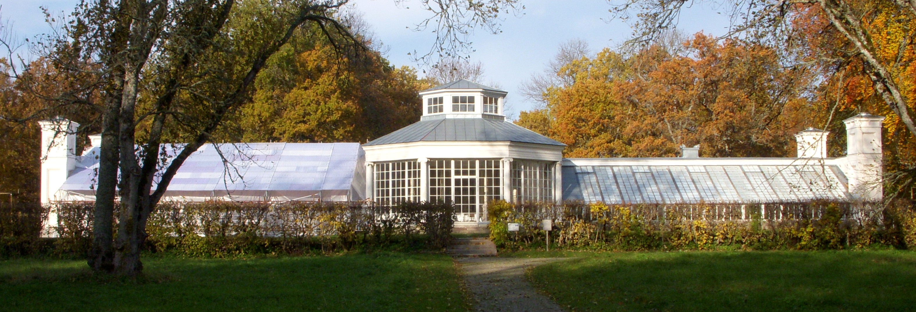 Oscar I:s orangeri på Tullgarns slott